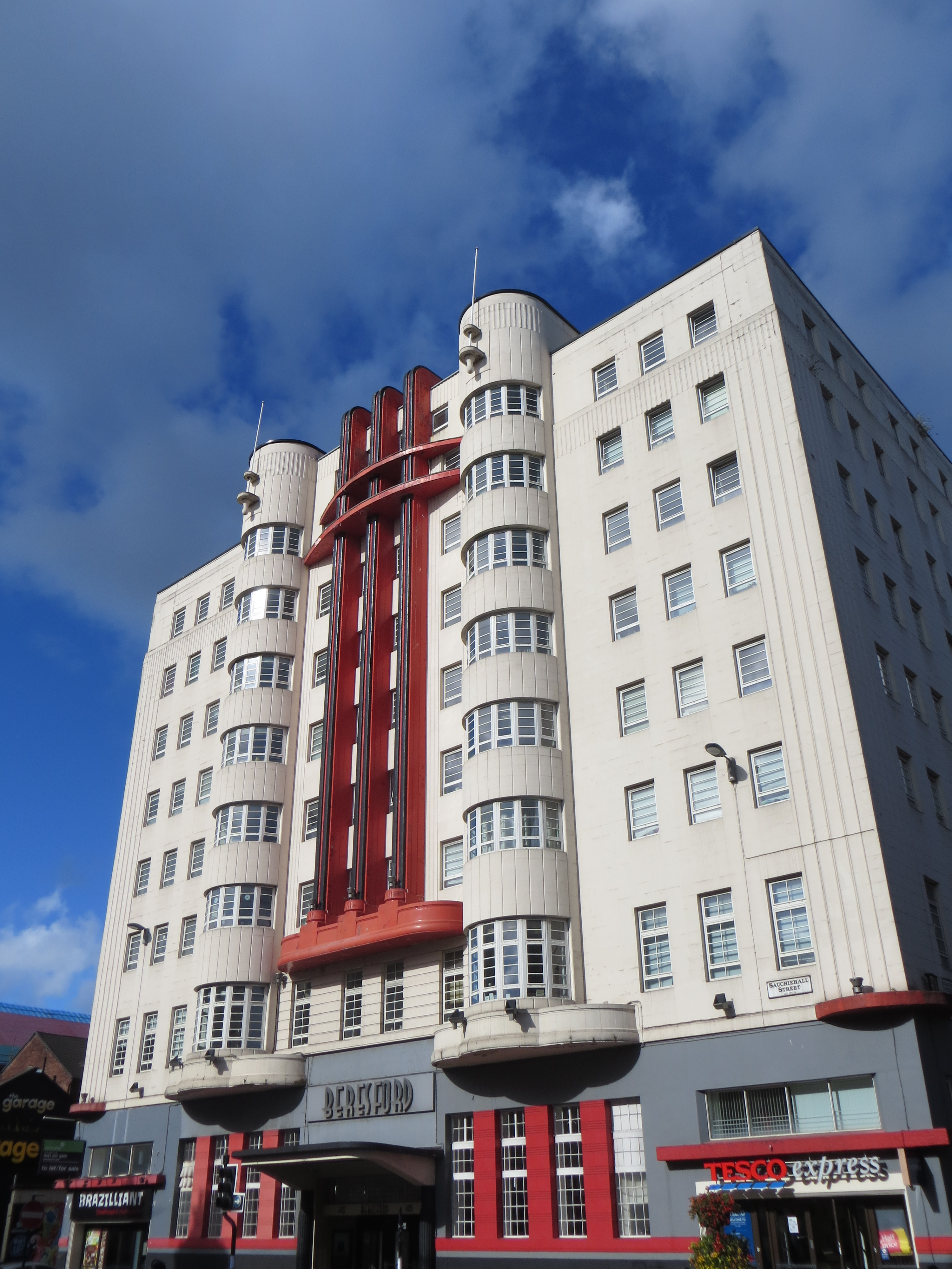 Glasgow